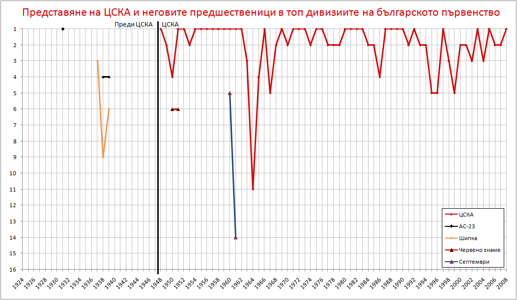 Представяне на ЦСКА и неговите предшественици в първенстбото на България по футбол